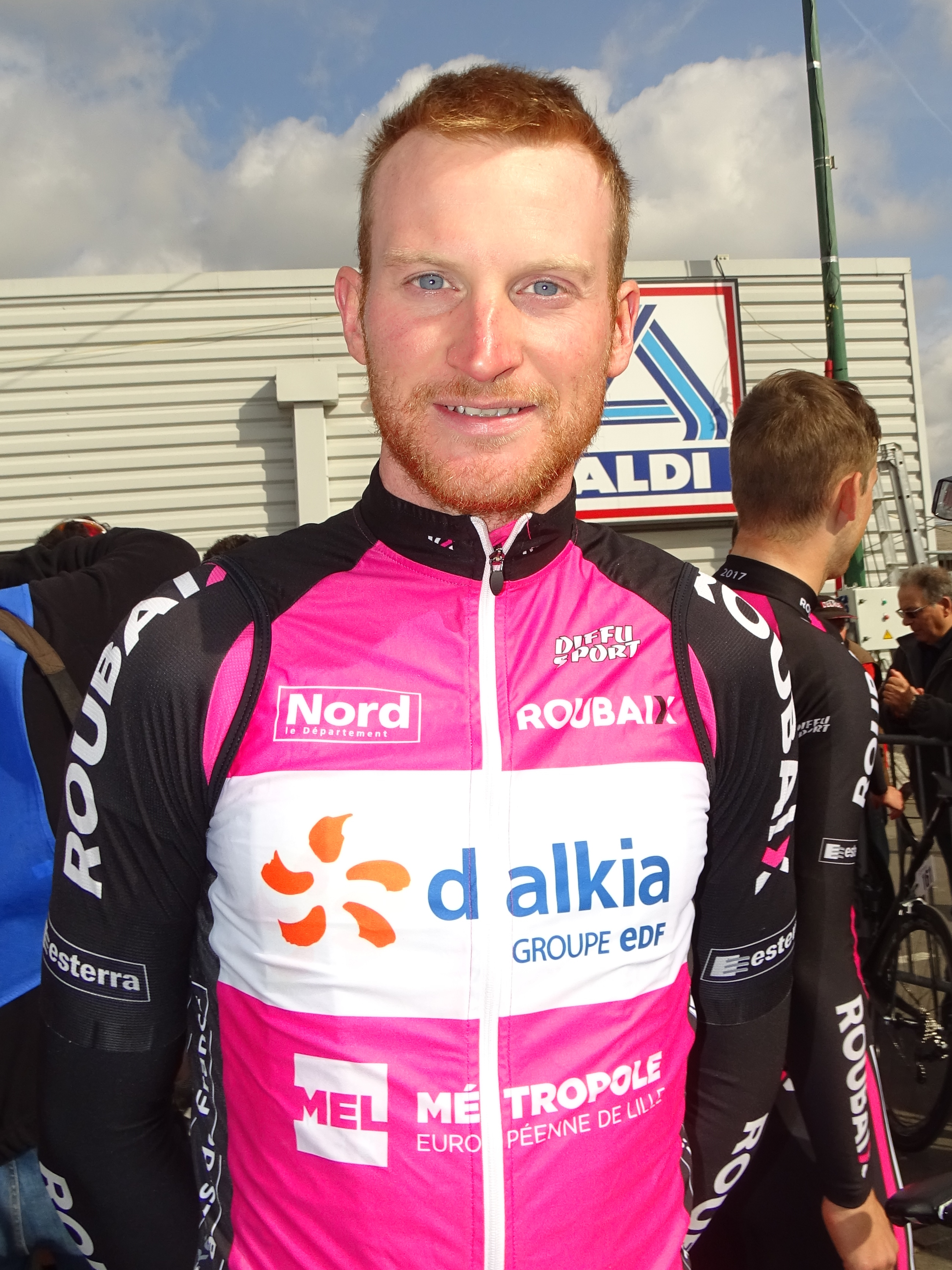 Reportage réalisé le jeudi 13 avril à l'occasion du départ et de l'arrivée du Grand Prix de Denain 2017 à Denain, Nord, Nord-Pas-de-Calais-Picardie, France.